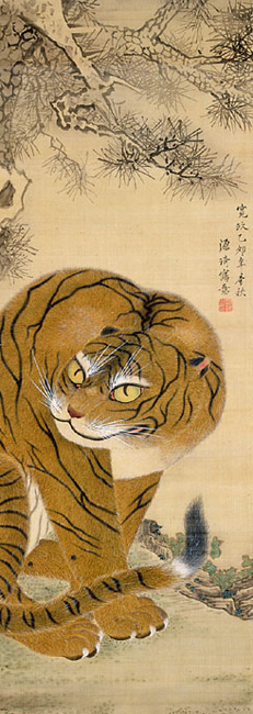 Painting by Komai Genki